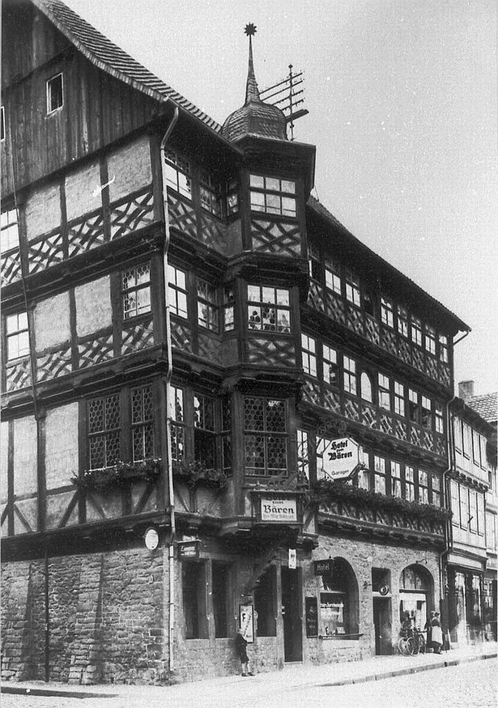 Wernigerode, Breite Straße 78, Faulbaumsches Haus von 1685 Foto: Möbius, Walter Aufn.-Nr.: df_m_0002674 Negativ Eigentümer: SLUB / Deutsche Fotothek